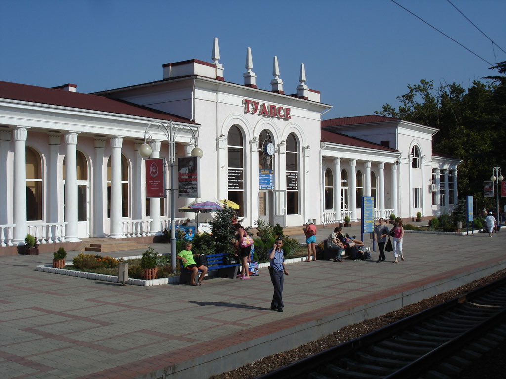 Фото ЖД-вокзала Туапсе